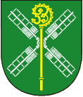 Znak obce Partutovice